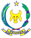 Brasão do município de Orizona, Estado de Goiás